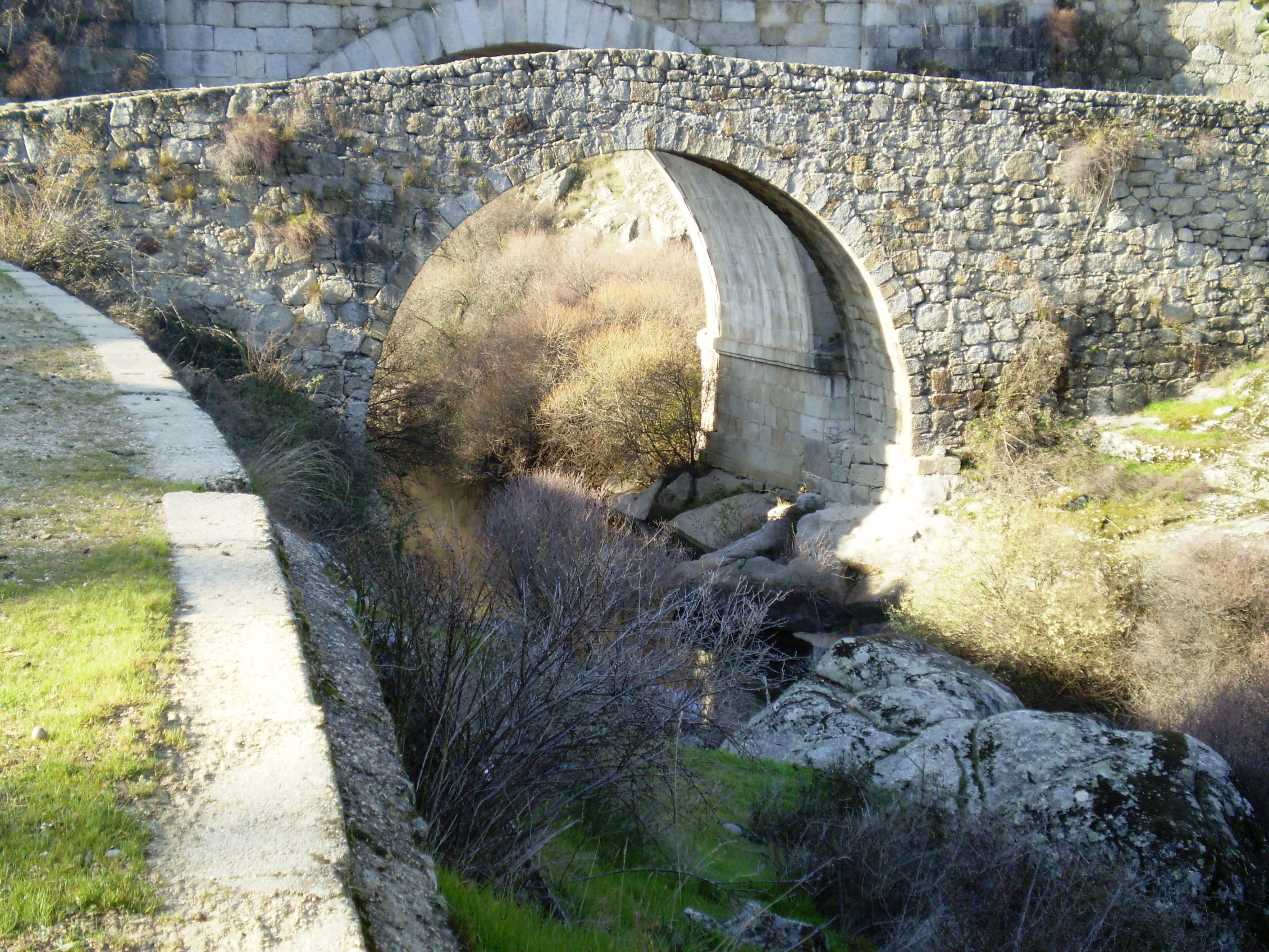 Grajal Bridge, over Manzanares River. Colmenar Viejo, Madrid, Spain